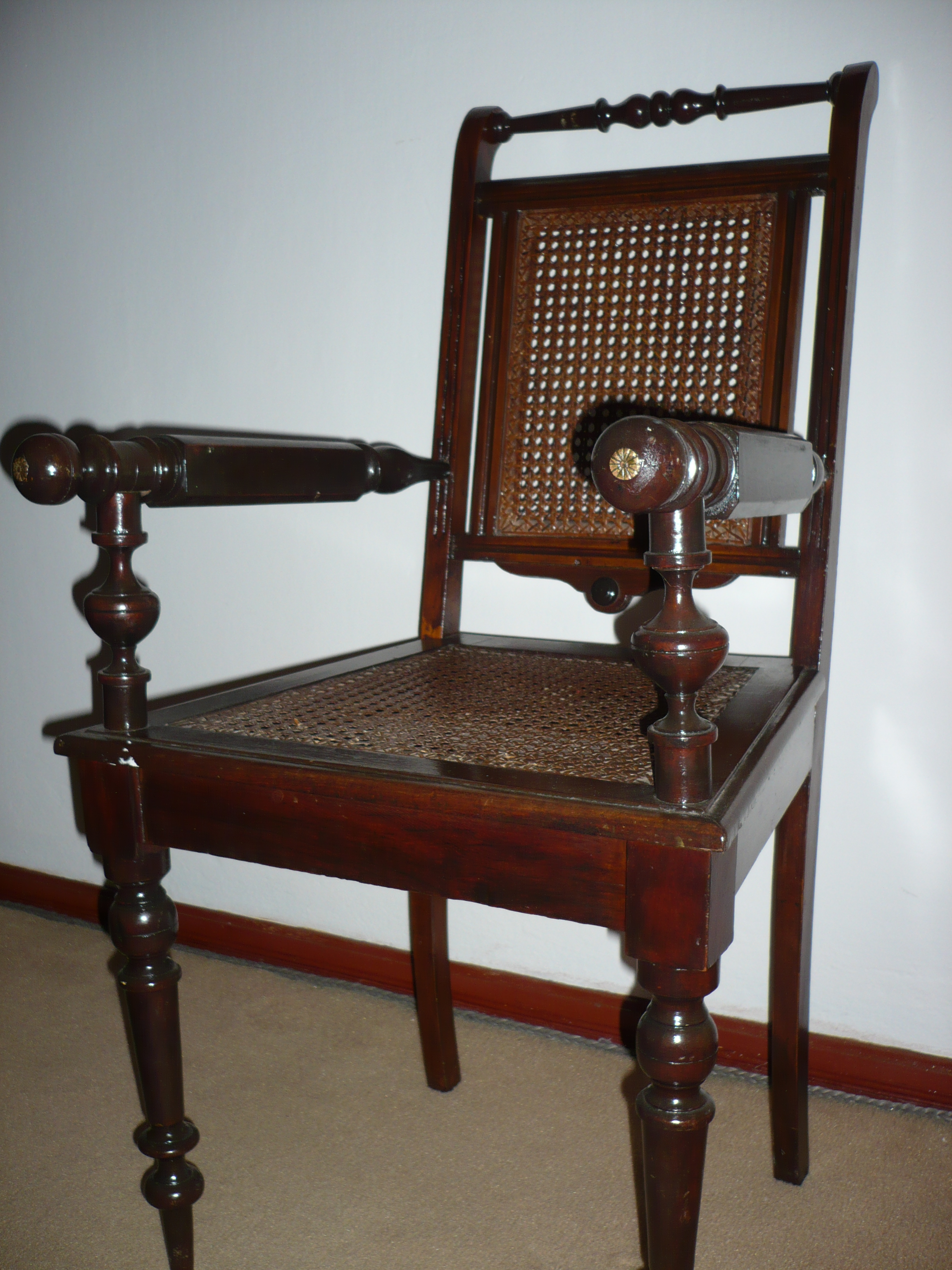 Uma cadeira feita pelo artista luso-brasileiro Luiz Dias dos Santos. A preferência do artista era trabalhos em madeira.